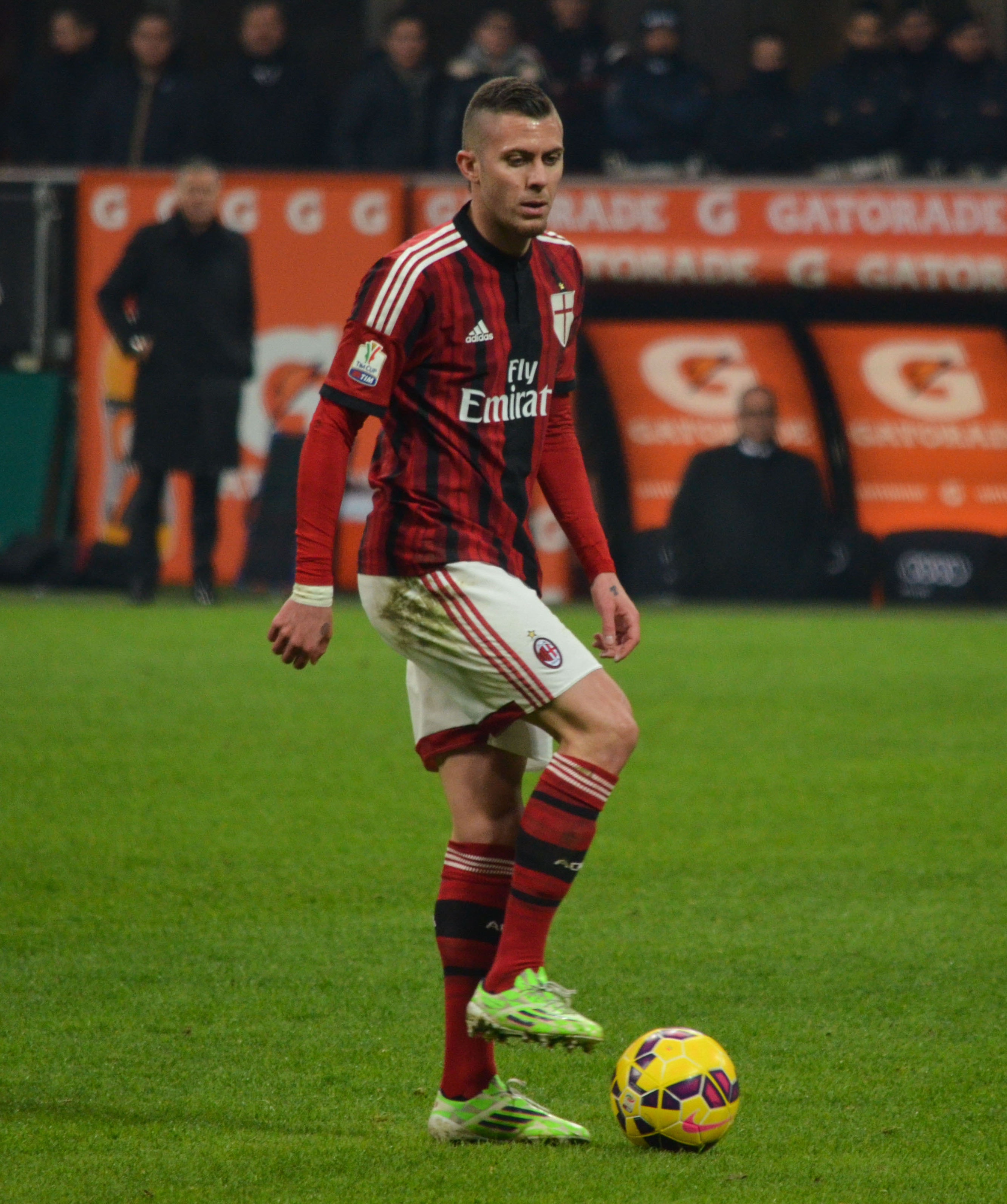 J. Menez in Milan-Lazio di Coppa Italia 2015